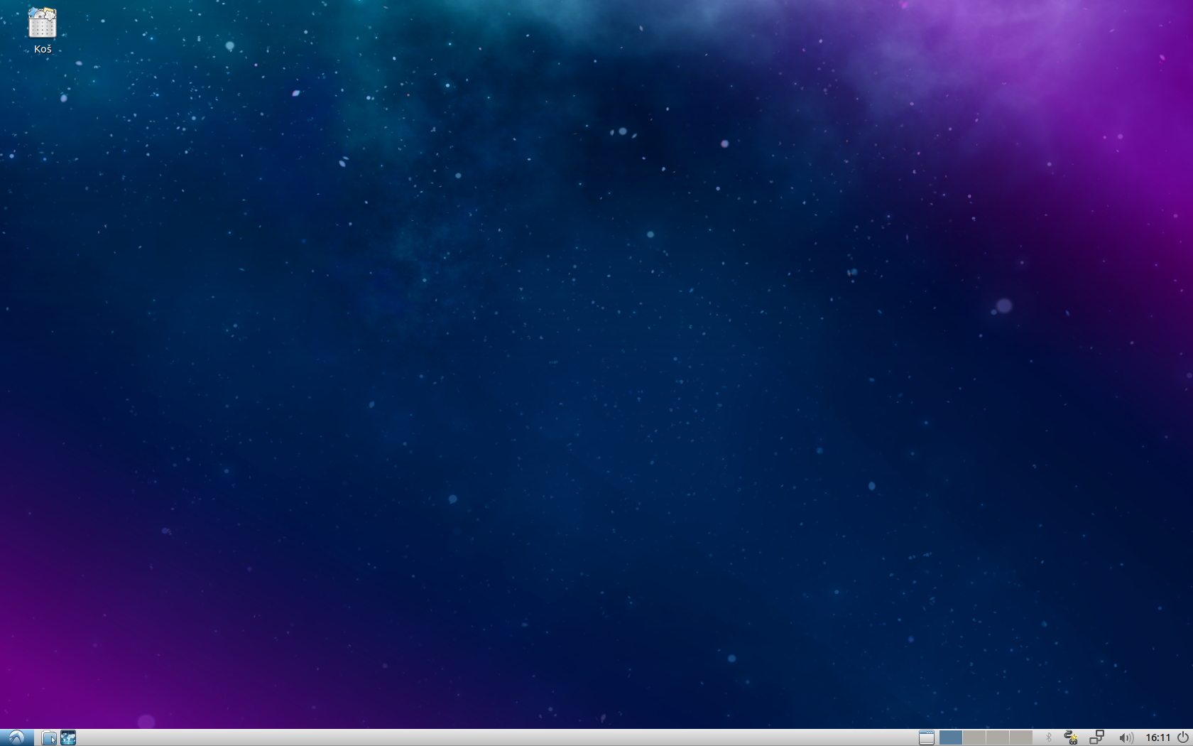 Lubuntu 18.04 v češtině